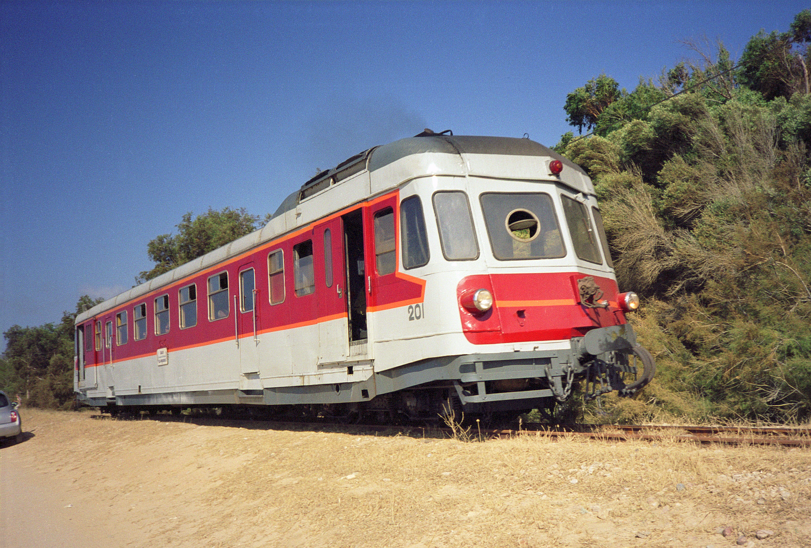 L'autorail ABH8-201 des chemins de fer de la Corse à Aregno-plage le 20 juillet 2005.